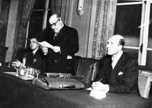 Discours de Salah Farhat à Paris à l’occasion de la plainte Tunisienne contre la France à l’ONU en 1952, avec à sa droite Maître Taabouri et à sa gauche le Dr Ahmed Ben Milad.